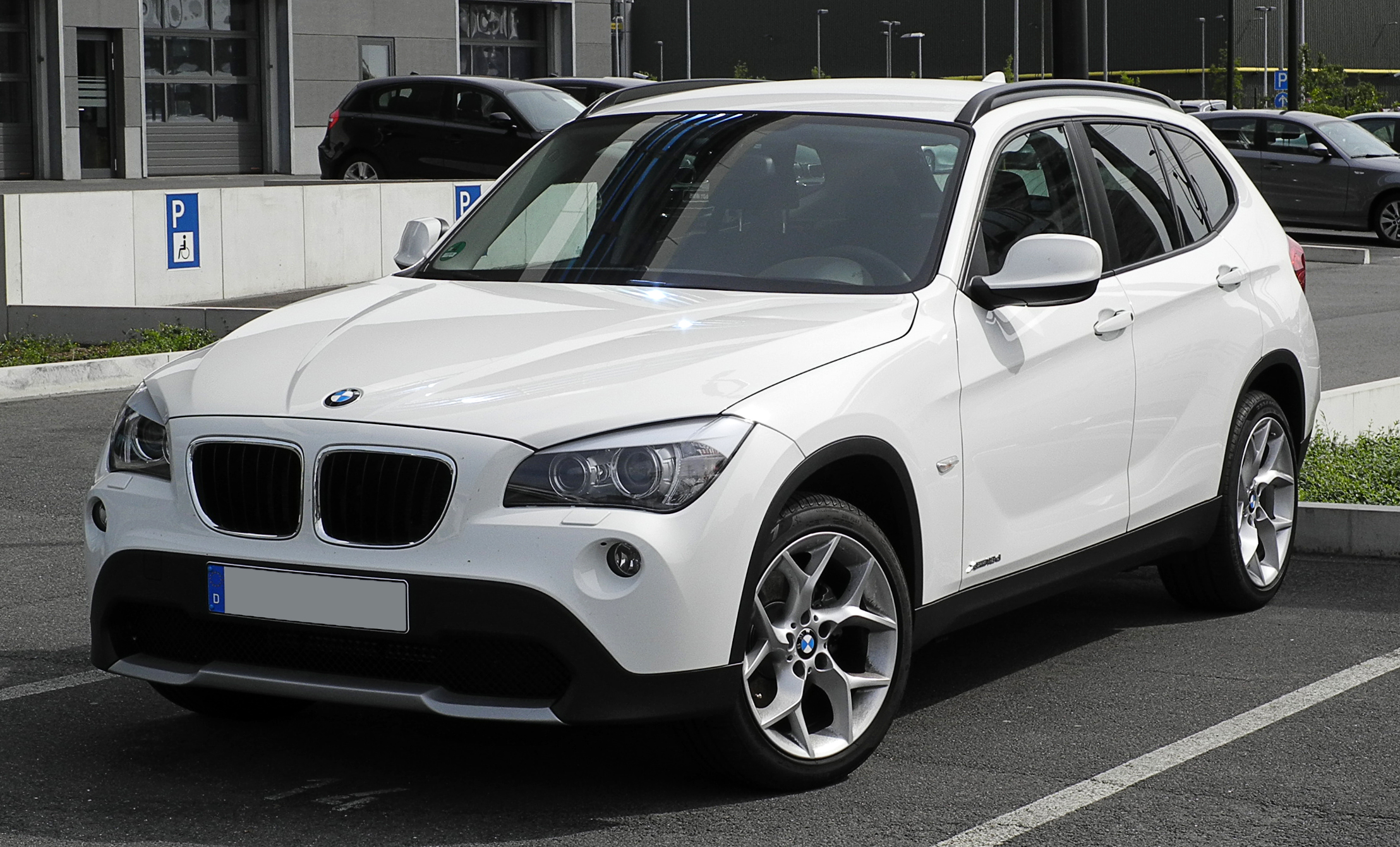 BMW X1 xDrive18d (E84)